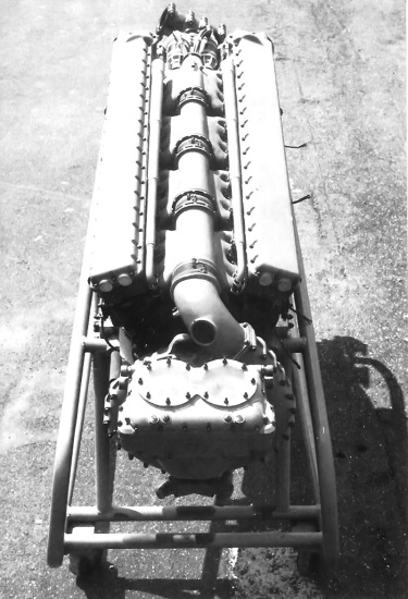 Fiat AS.8 vista post. Licensing categoria:immagini di aeroplani